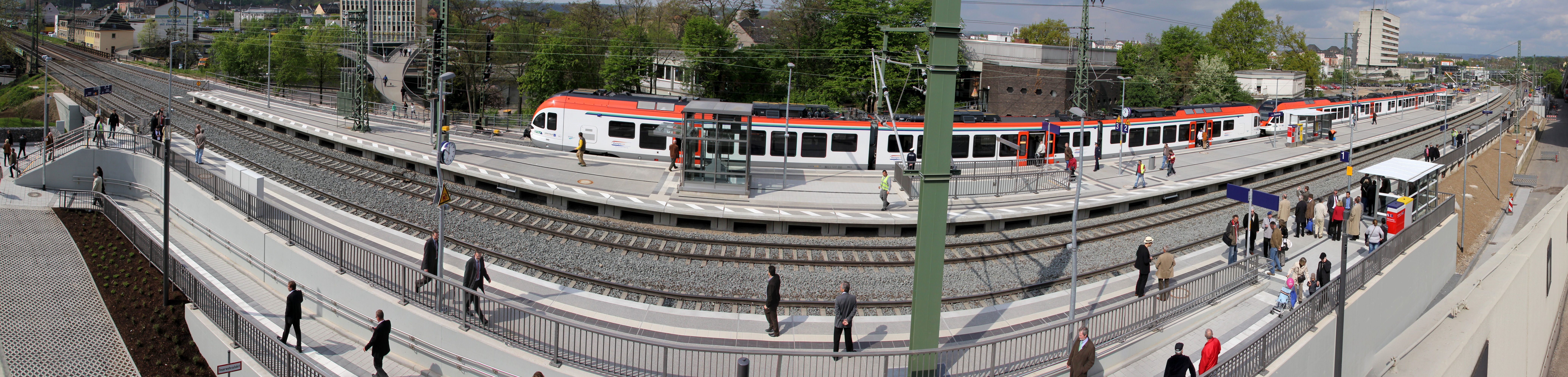 Koblenz im Buga-Jahr 2011 - Panorama des Haltepunkts Koblenz Stadtmitte